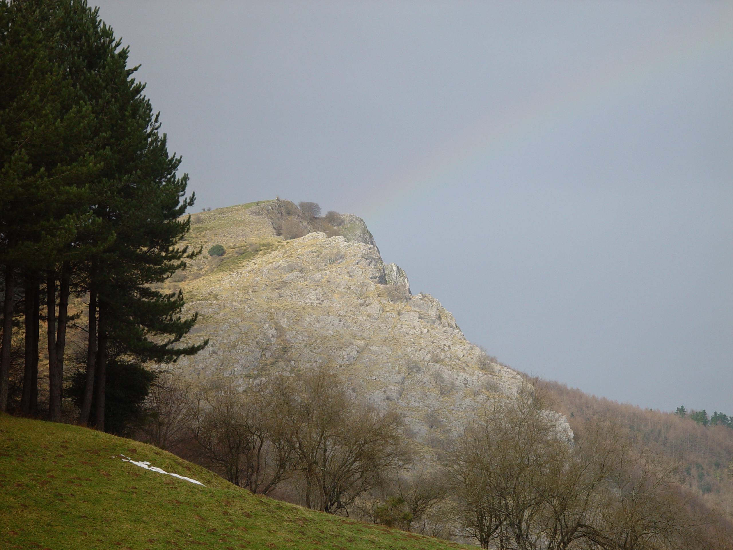 Murumendi, Gipuzkoako mendia.